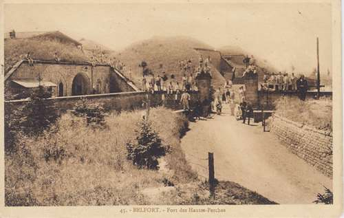 Fort des Hautes-Perche